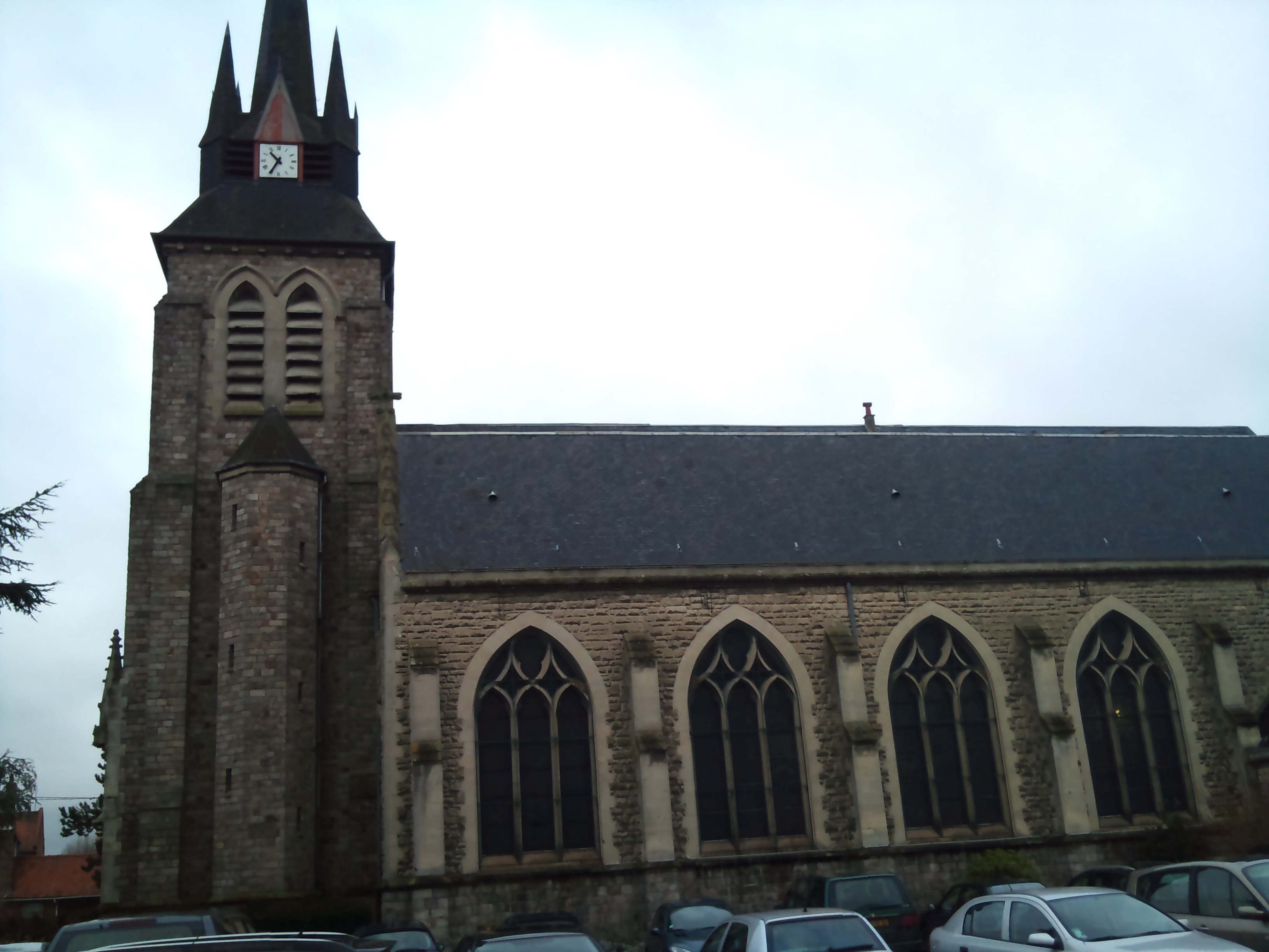 Église de La Couture